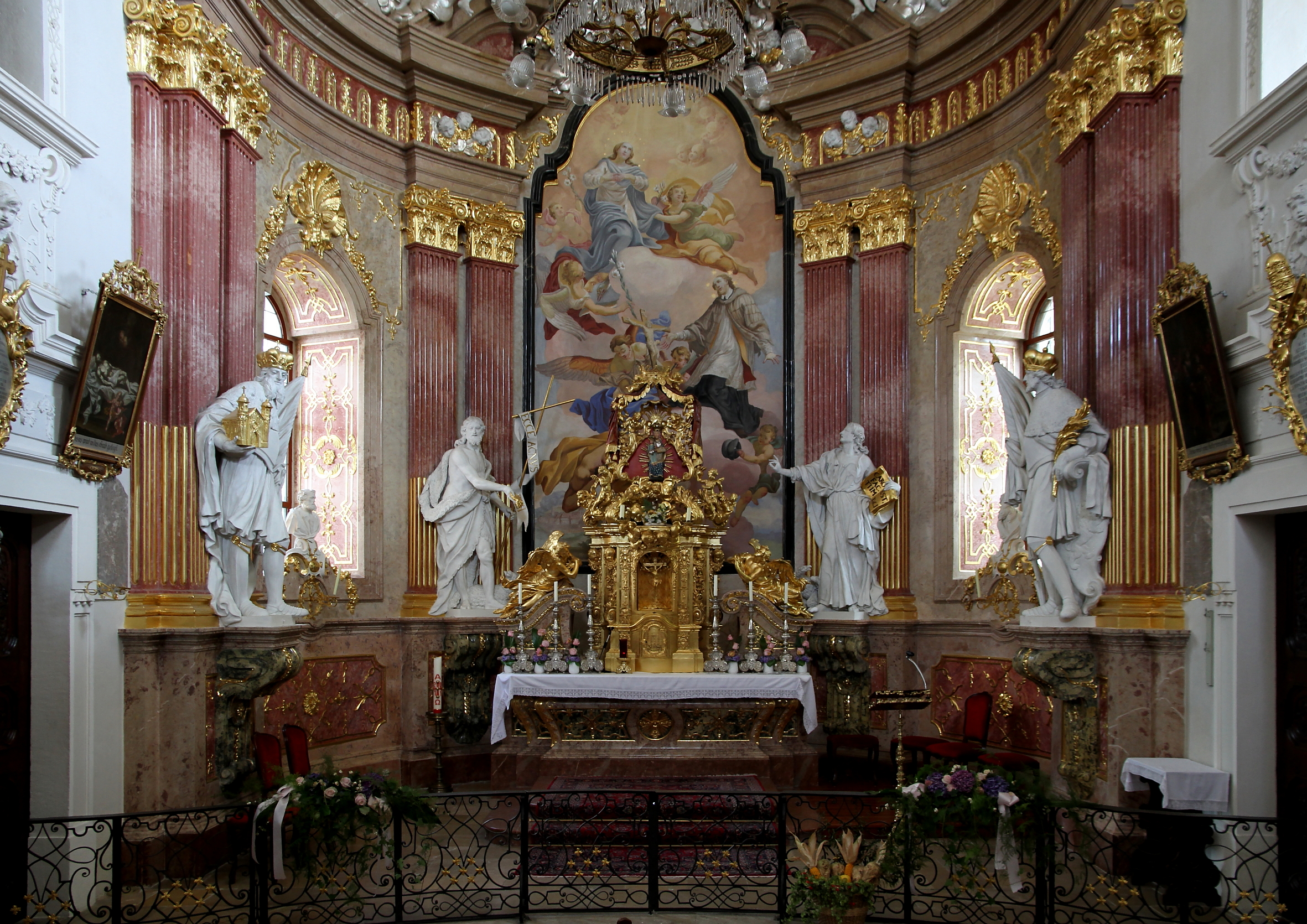 Der Hochaltar der ehemaligen Klosterkirche hl. Johannes Nepomuk in der niederösterreichischen Stadt Tulln an der Donau.